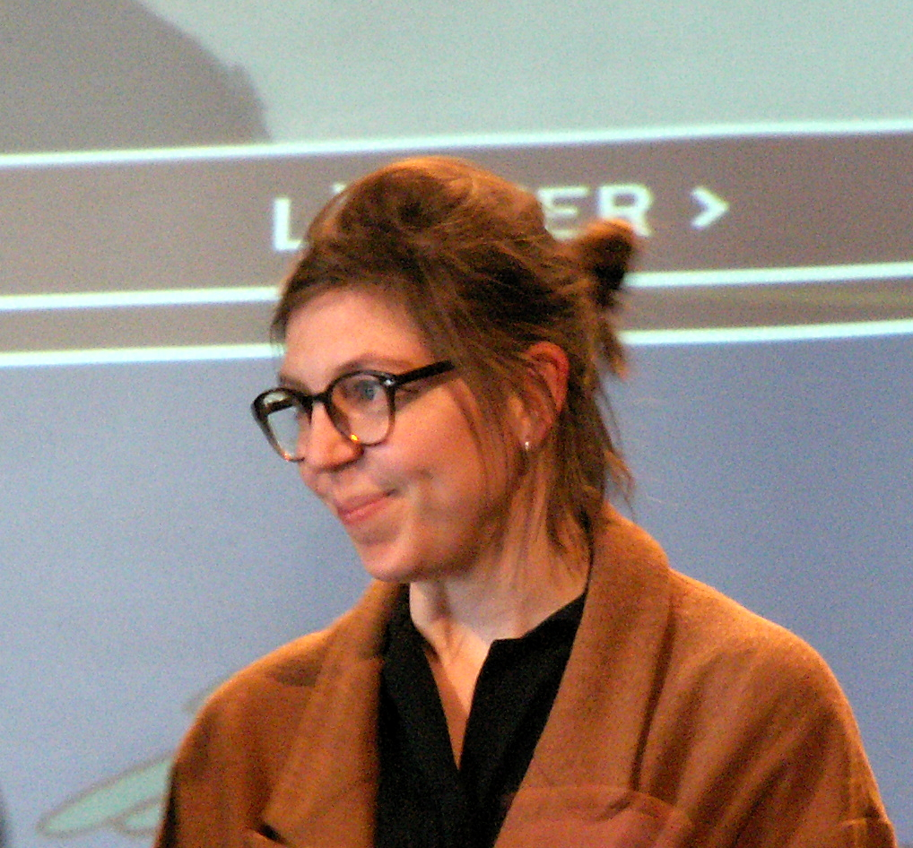 Joanna Hellgren.